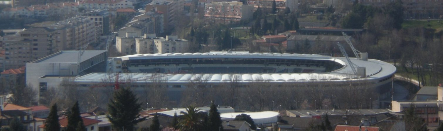 Estádio do Vitória de Guimarães visto da torre central do Castelo de Guimarães.